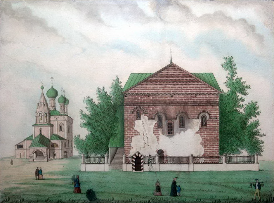 Дворец царевича Димитрия. Василий Иванович Серебреников середина XIX в. (бумага, акварель)